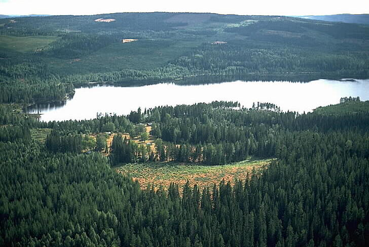 Motiv: Kårebolsätern Nyckelord: Flygbilder, Riksintressen Kategori: Fäbodsmiljö Kårebolsätern